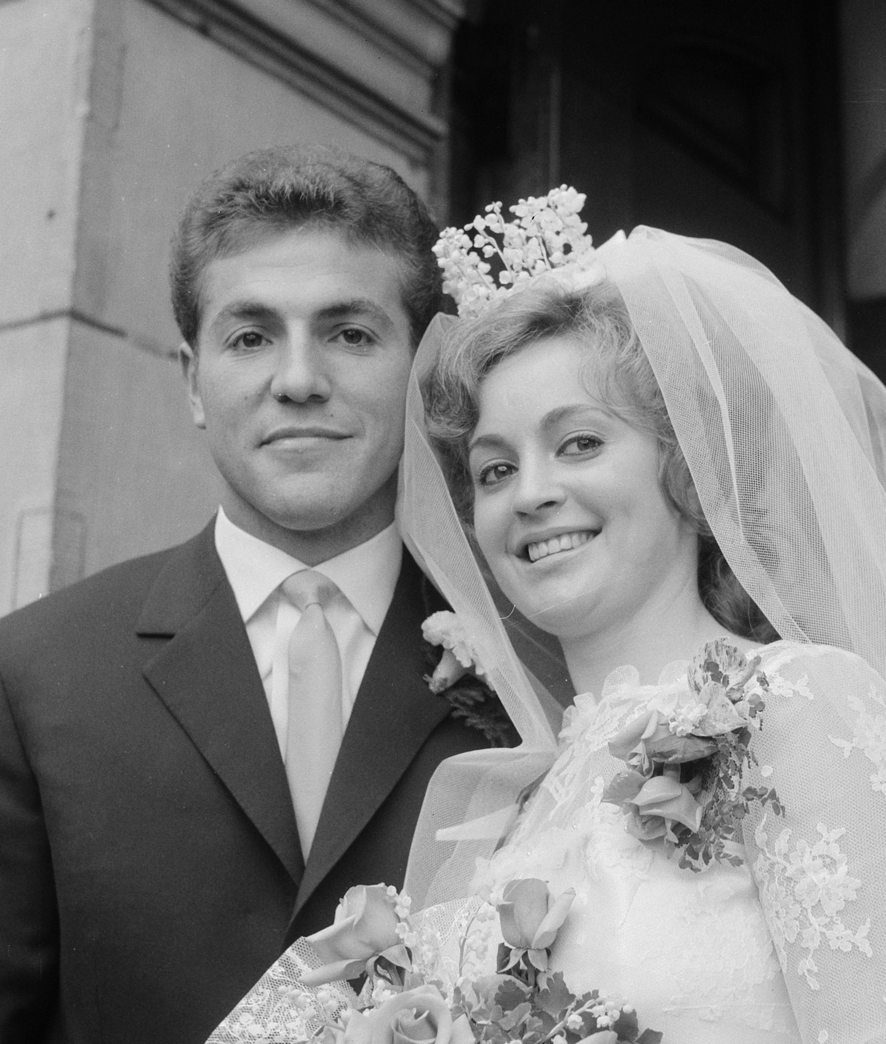 Huwelijk Bennie Muller